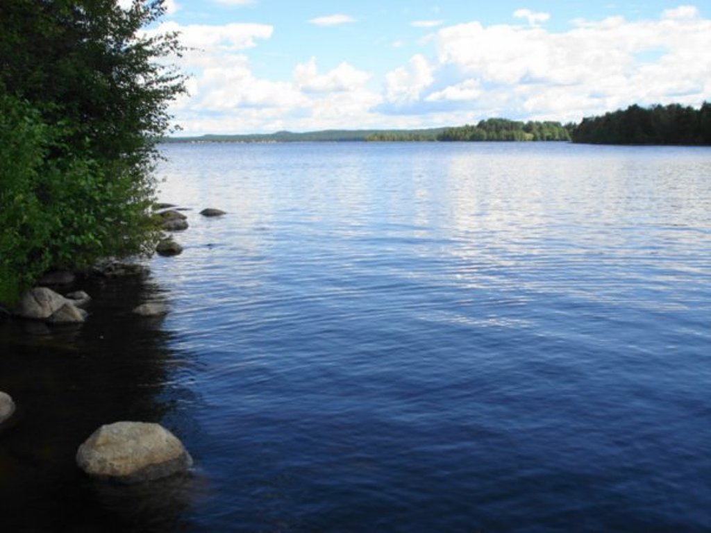 Lake Syamozero at Essoyla/Jessoila